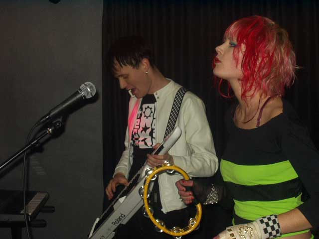 En bild på Alice in Videoland när de spelade på Klubb Utopi i Skövde